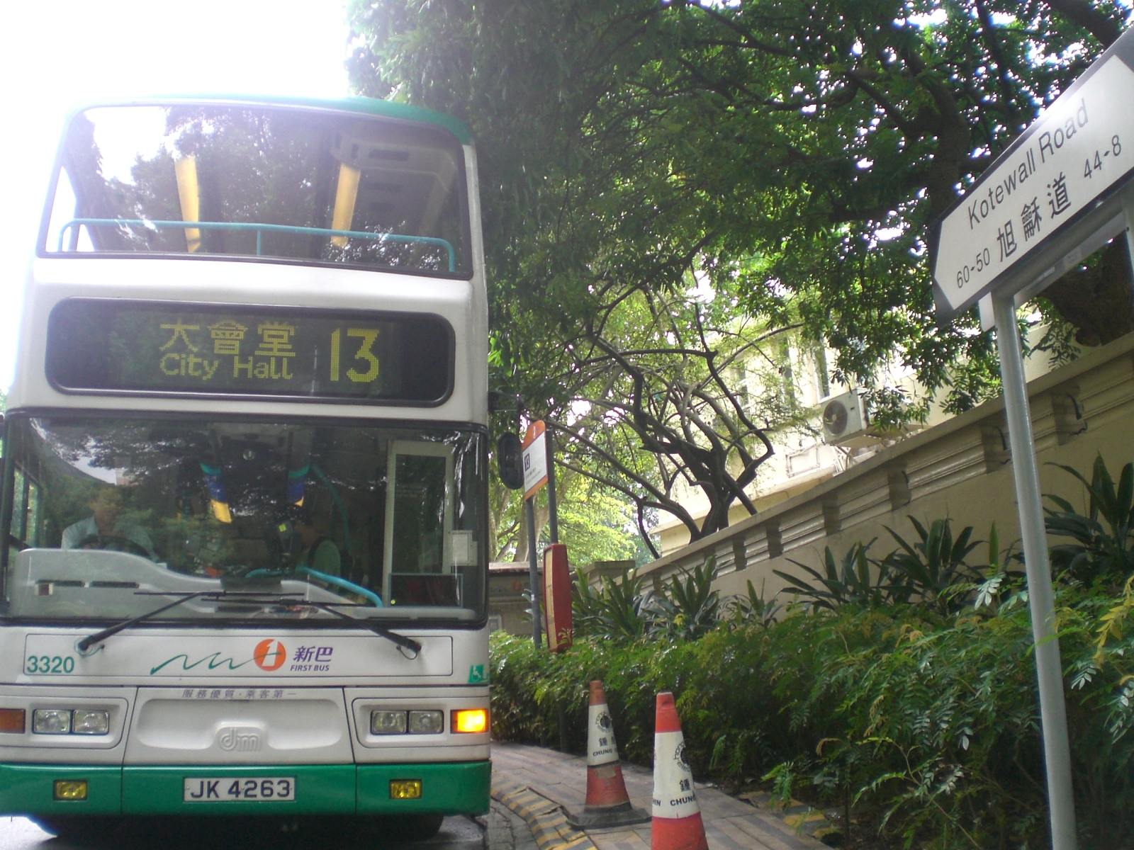 新巴13號車終站，旭龢道